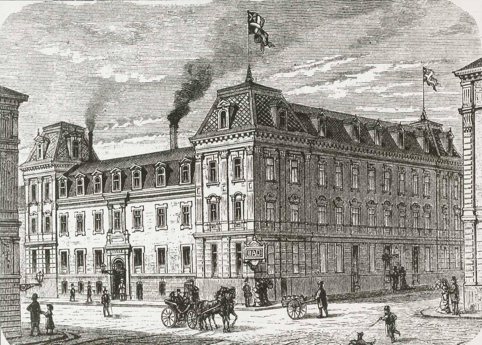 Malmtorgsbadet i tidningsannons 1892